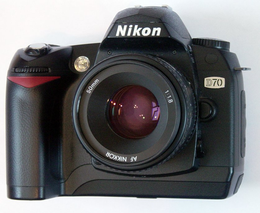 Digtal SLR Nikon D70.